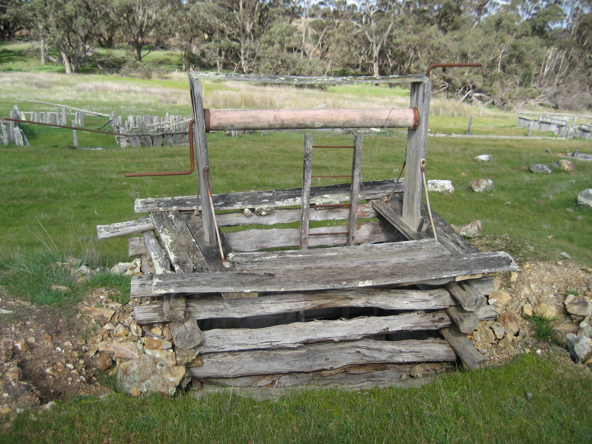 Gold mine, Kendenup, Western Australia